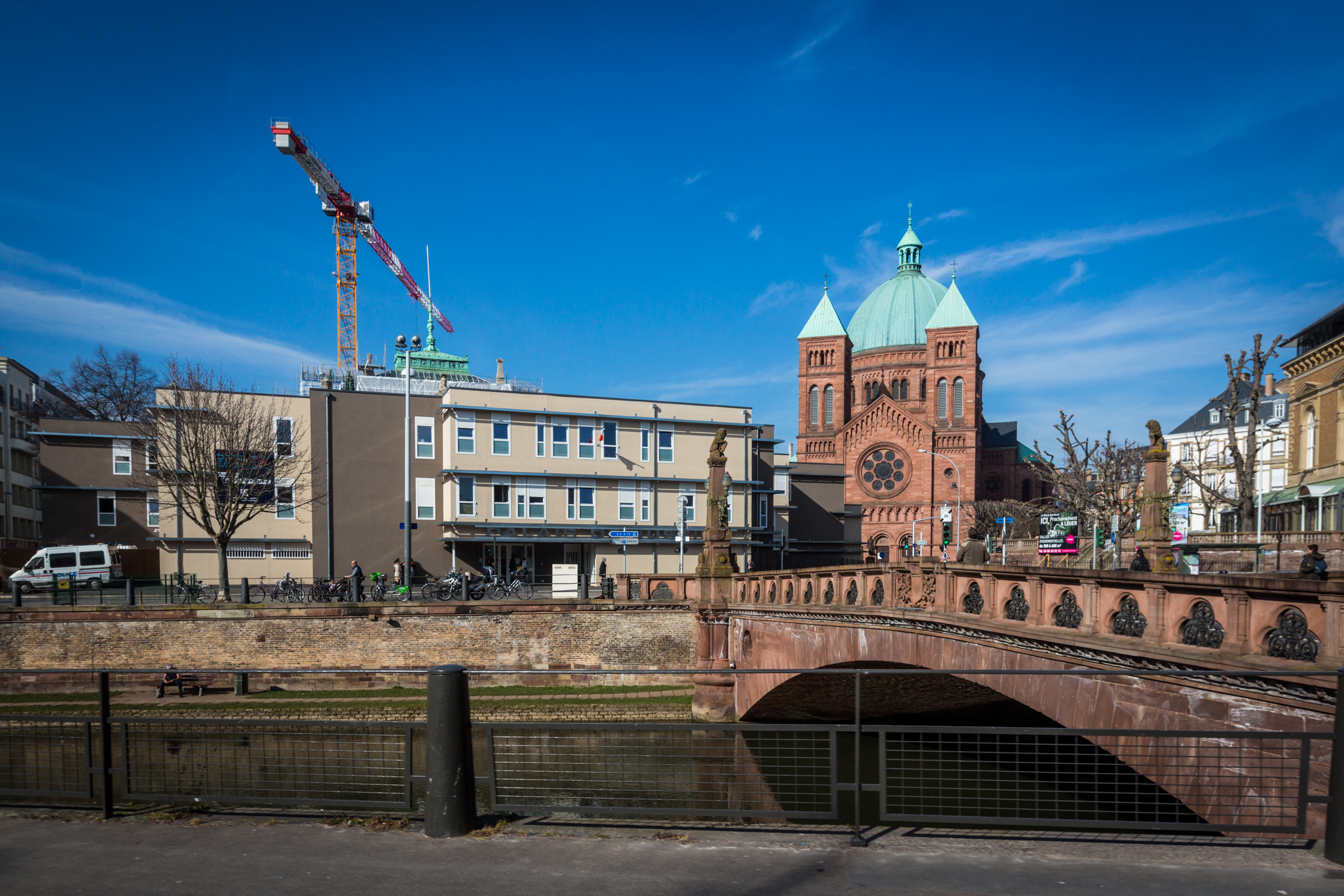 Strasbourg palais de Justice provisoire et église Saint Pierre le Jeune